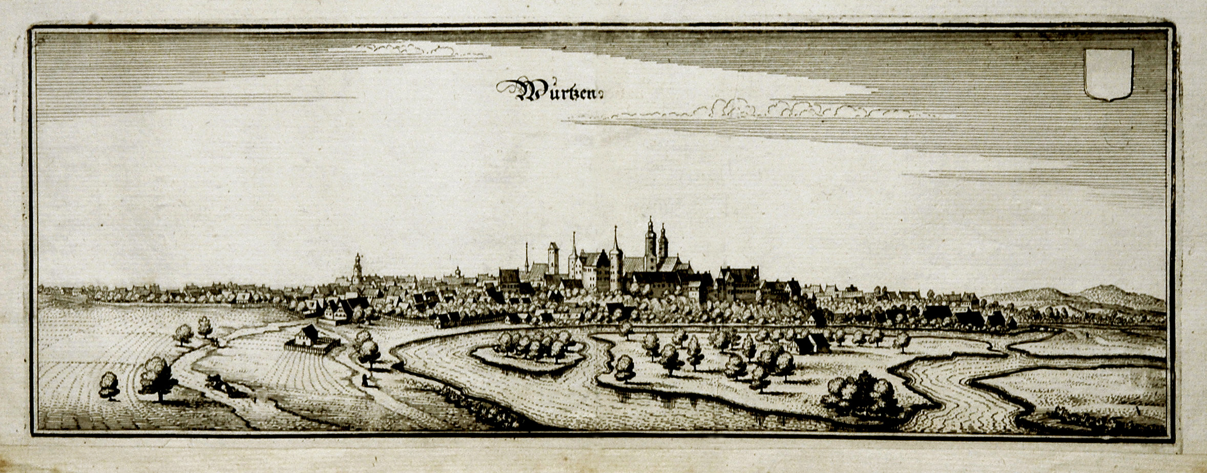 Wurzen um 1650; Kupferstich von Matthäus Merian, 1650 12 x 33cm